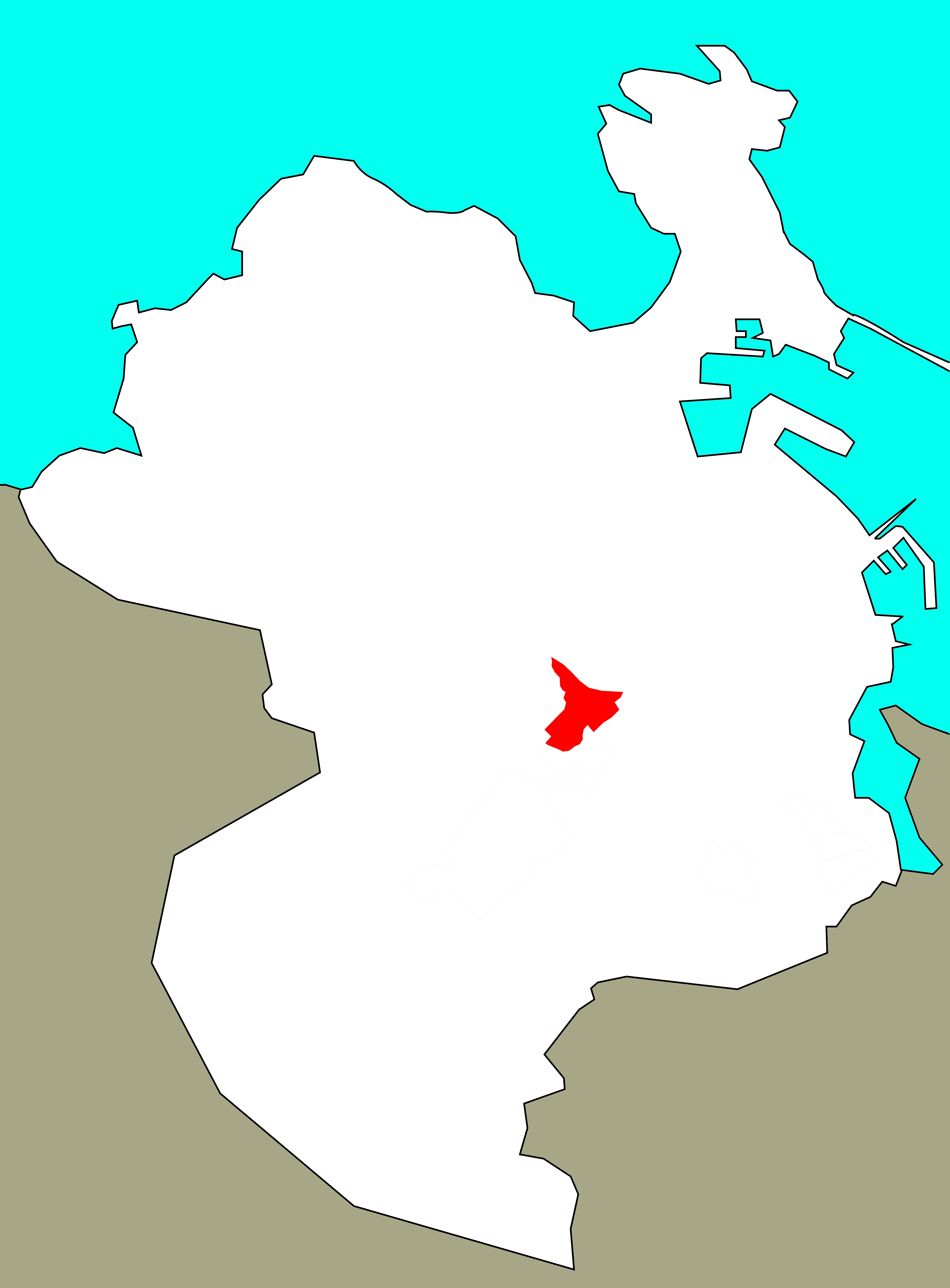 Situación do Birloque no concello da Coruña.[1]